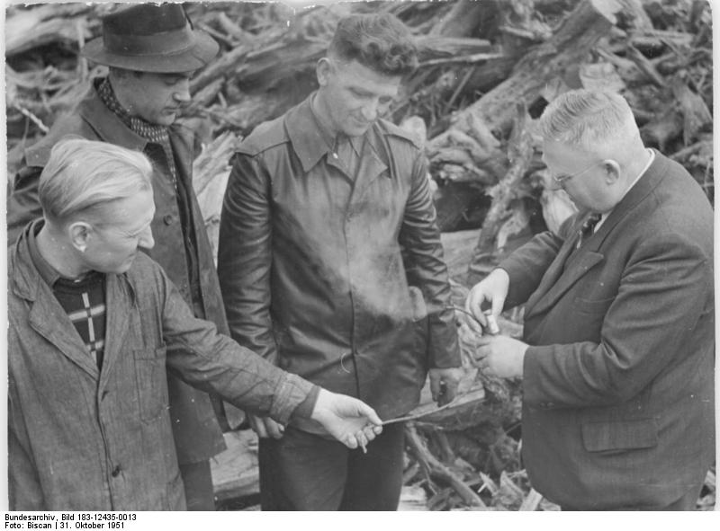 Sprengschüsse für den Frieden. Sprengmeister Willi Kummert erzielt Einsparungen von 223.000 DM im Jahre. Die einzige Sprengmeister-Brigade der ausgezeichneten Qualität. Die Sprengmeisterbrigade der Bauunion Magdeburg, die auf diesem Spezialgebiet die einzige "Brigade der ausgezeichneten Qualität" ist, arbeitet an allen Schwerpunkten der DDR und steht in dem Ruf, auch die schwierigsten Sprengungen erfolgreich durchzuführen. Die Brigade hat unter anderem schon seit Jahren den Auftrag, die ausgedienten Walzer aller Walzwerke der DDR in faustgroße Brocken zu zertrümmern und diese wertvollen Speziallegierungen, die für unseren Aufbau unentbehrlich sind, wieder den Stahlgießereien zuzuführen. Sprengmeister Willi Kummert entwickelte bei der Sprengung dieser ungewöhnlichen harten Walzen eine neue Arbeitsmethode, durch die jährlich 223.000 DM eingespart werden. UBz: Eine Zündschnur wird geprüft. Sprengingenieur Weichelt prüft mit einigen Sprengmeistern eine Zündschnur auf die vorgeschriebene Brenndauer. Illus Biscan 31.10.51 Wa-Be.